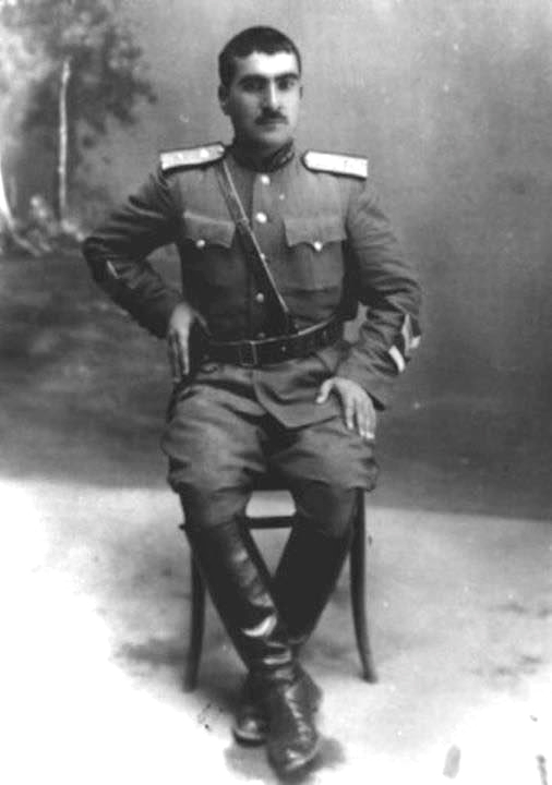 Барзани в форме генерала Мехабадской республики (форма советского происхождения)